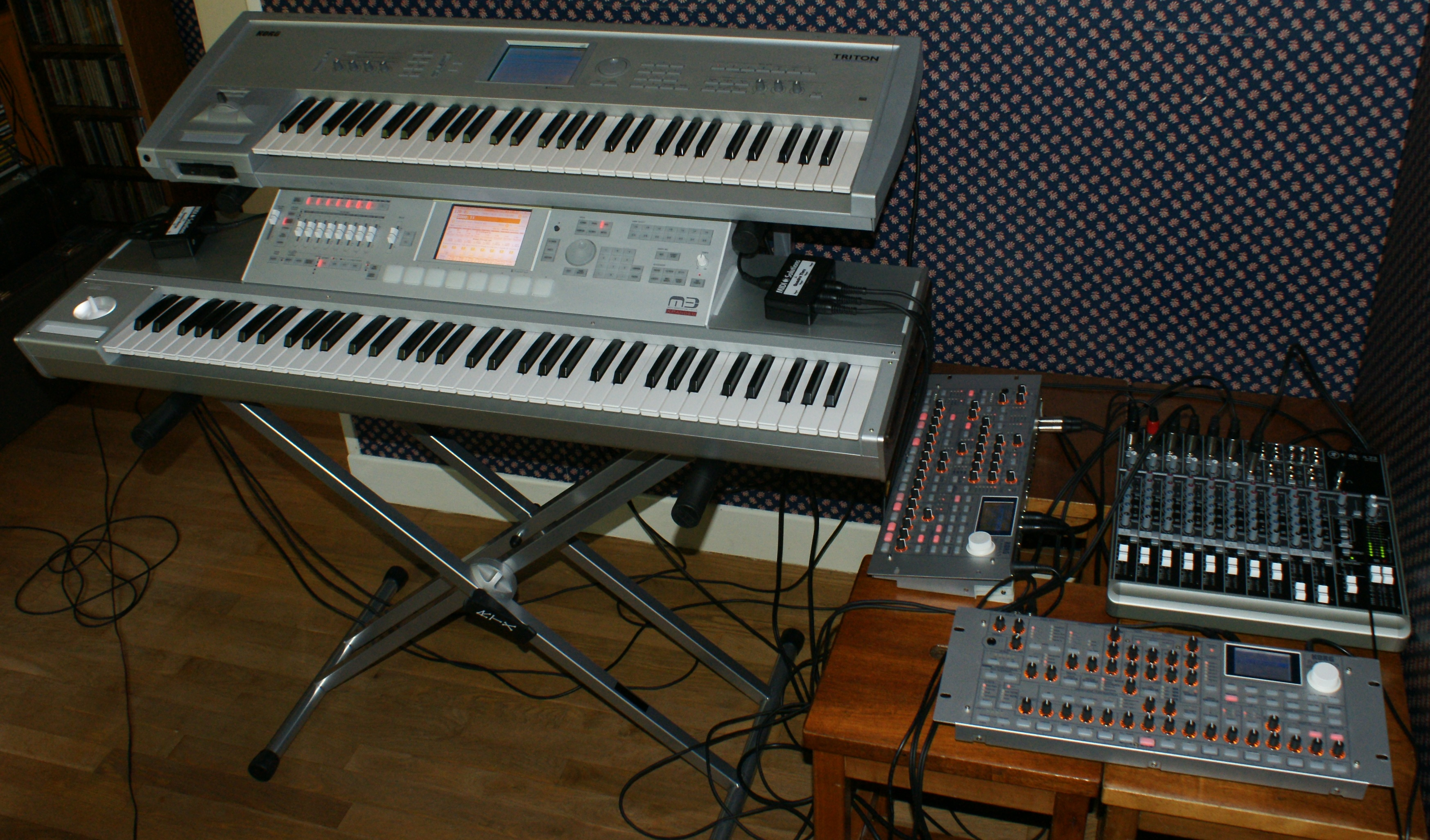 2 synthétiseurs KORG (le M3 73 et le Triton 61) ainsi que le Radias-R en paire